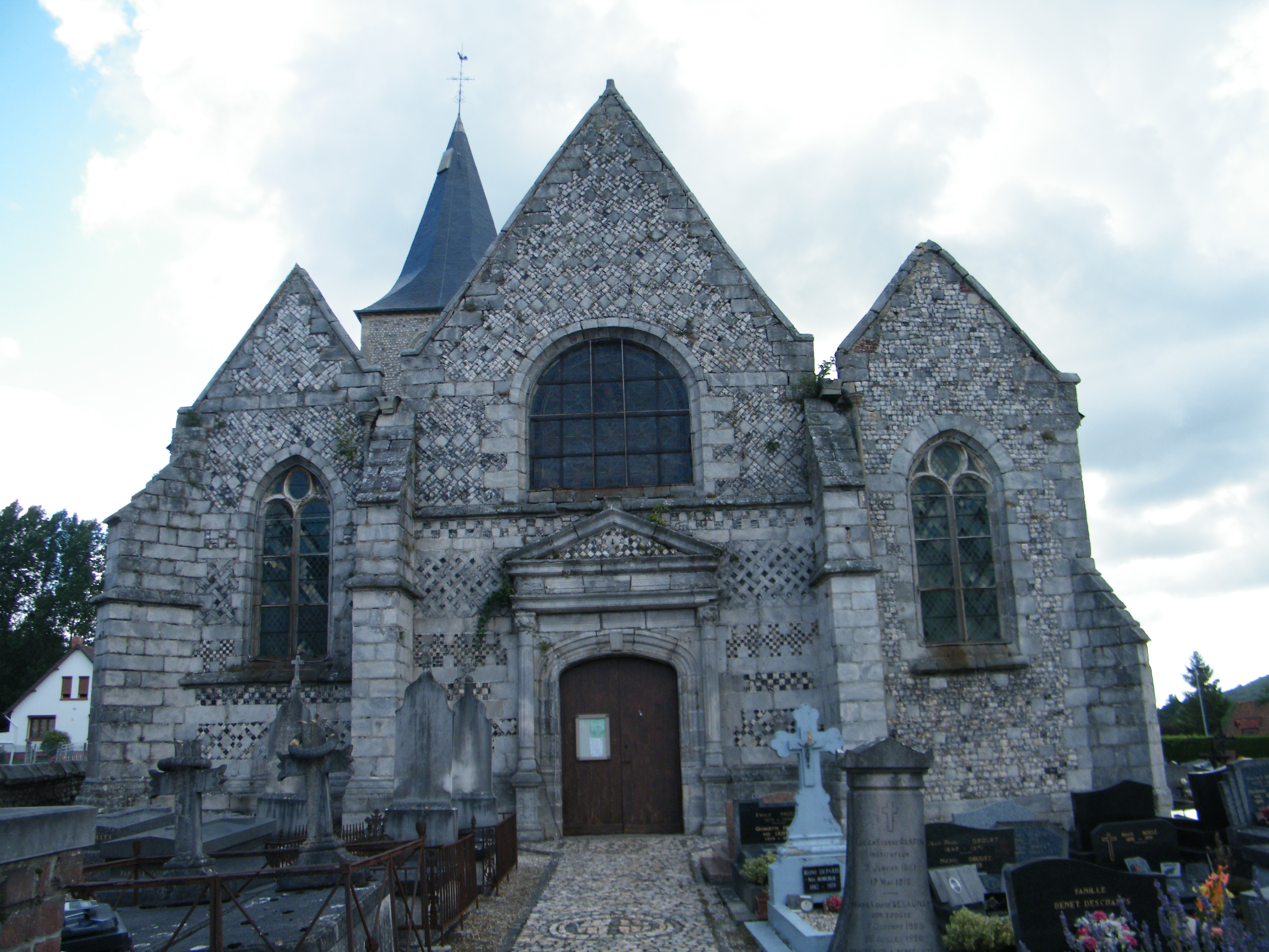 Ancourt, Seine-Maritime, France, église (3)